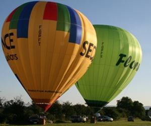 Fête de la Musique à vigy